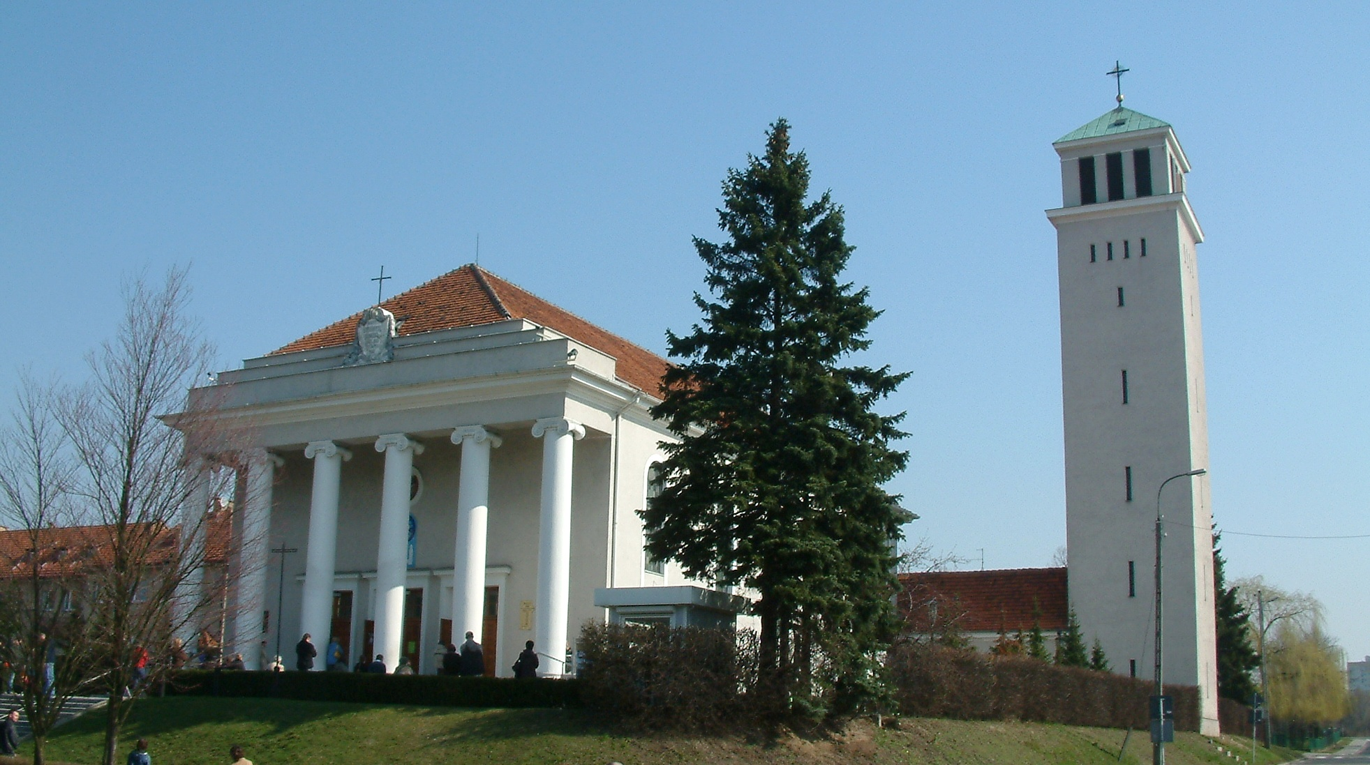 Church of St. Stanislaus Kostka in Poznań